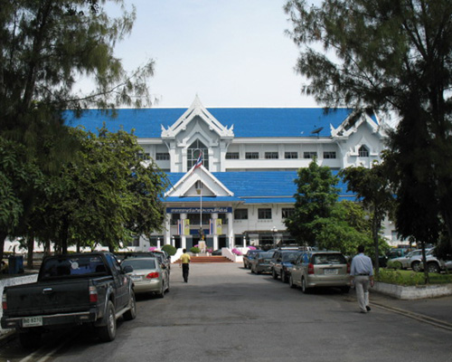 Prachuap Khiri Khan City Hall